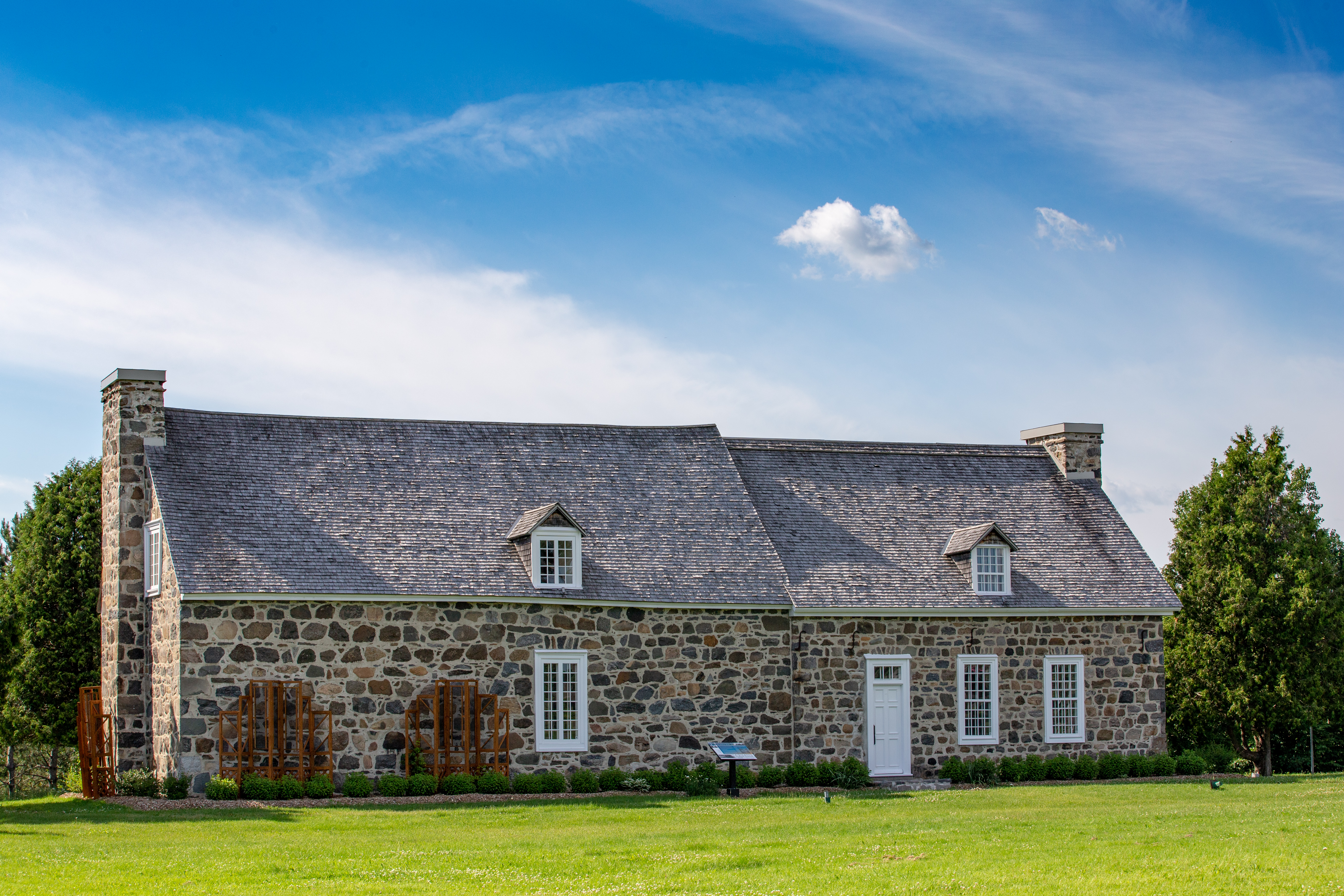 Façade du Manoir Trent à Drummondville. Classé immeuble patrimonial en 1964.